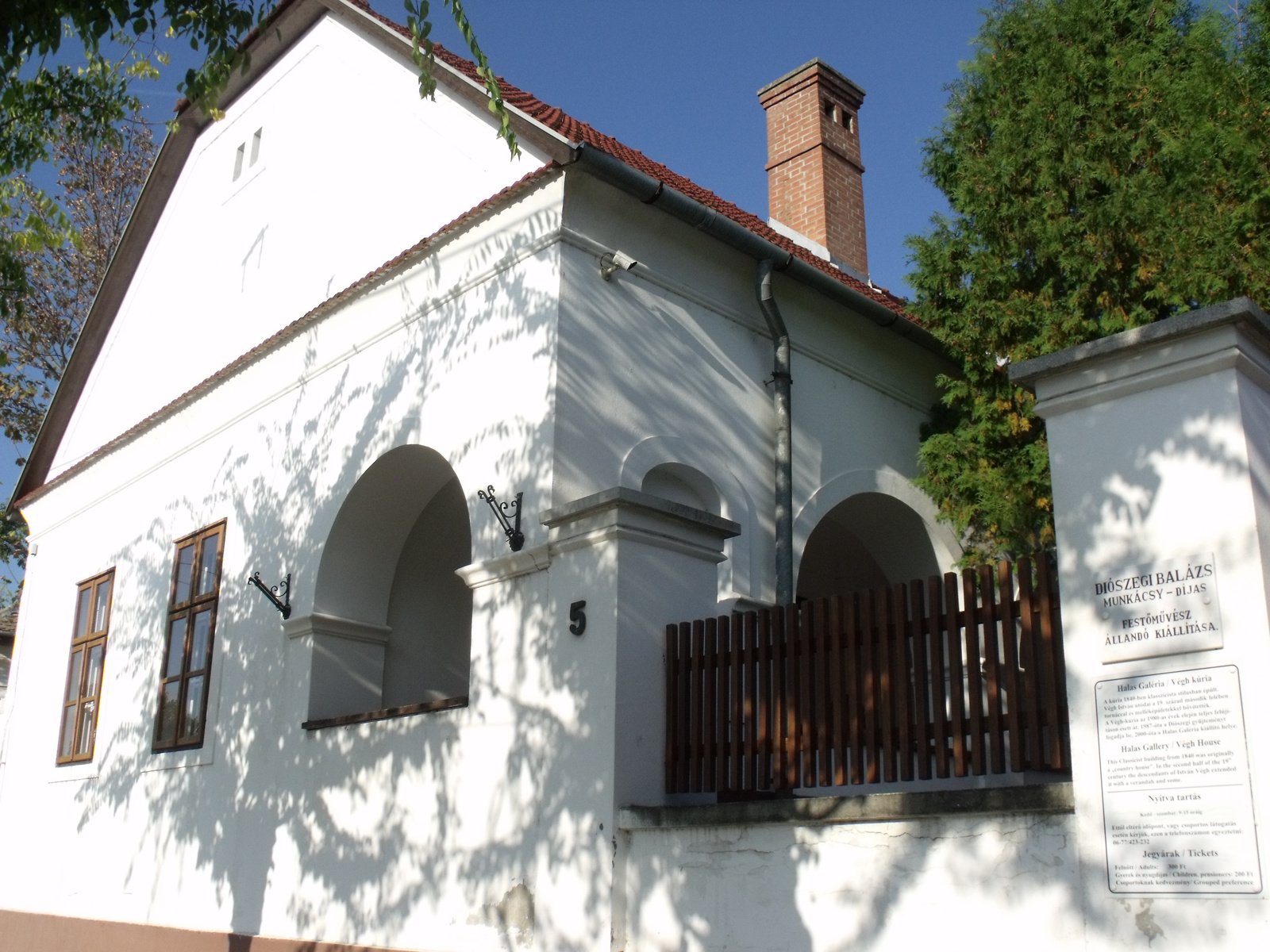 Végh-kúria (Kiskunhalas, Bajcsy-Zsilinszky utca 5.) This is a photo of a monument in Hungary. Identifier: 2295